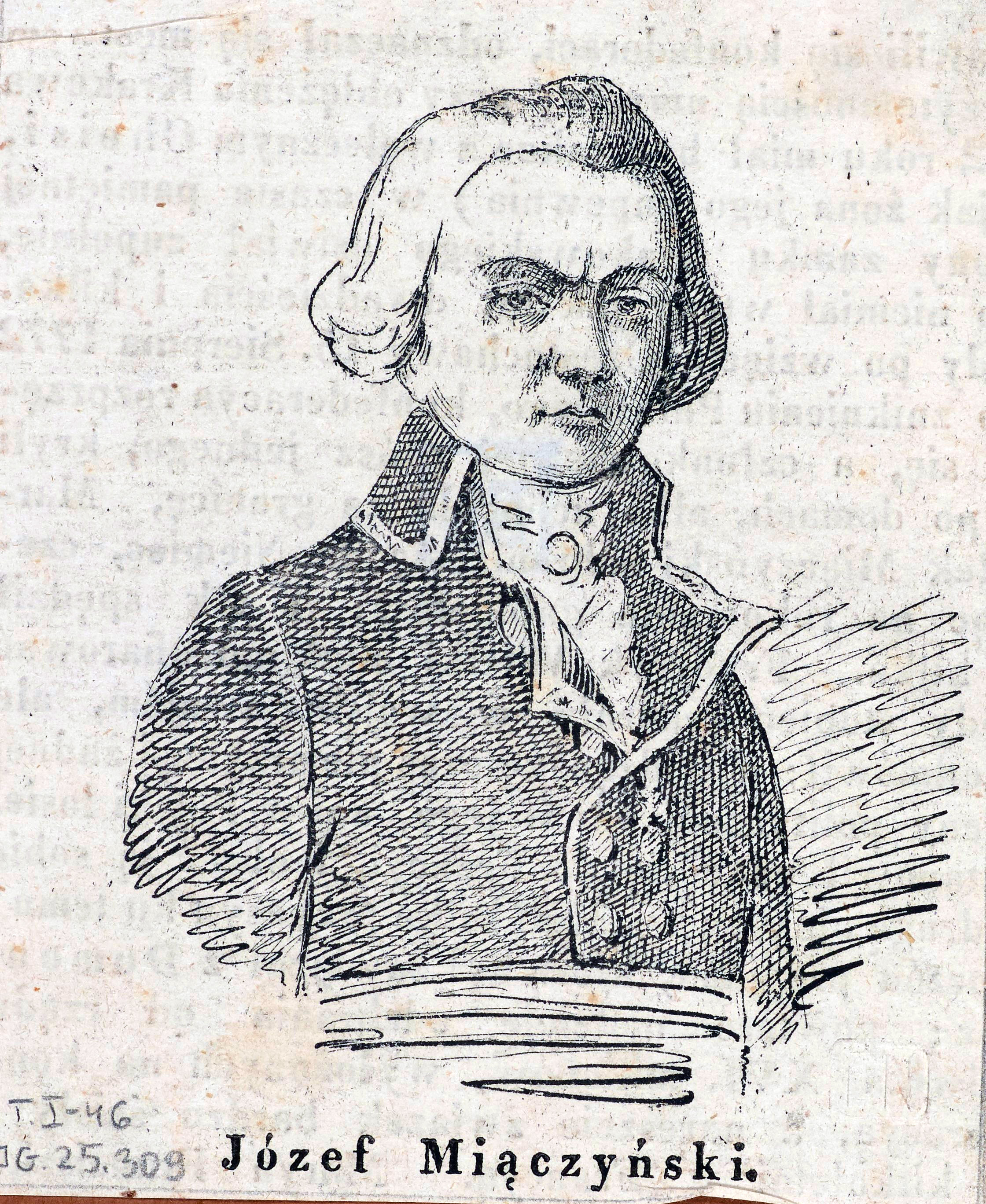 Józef Miączyński młodszy